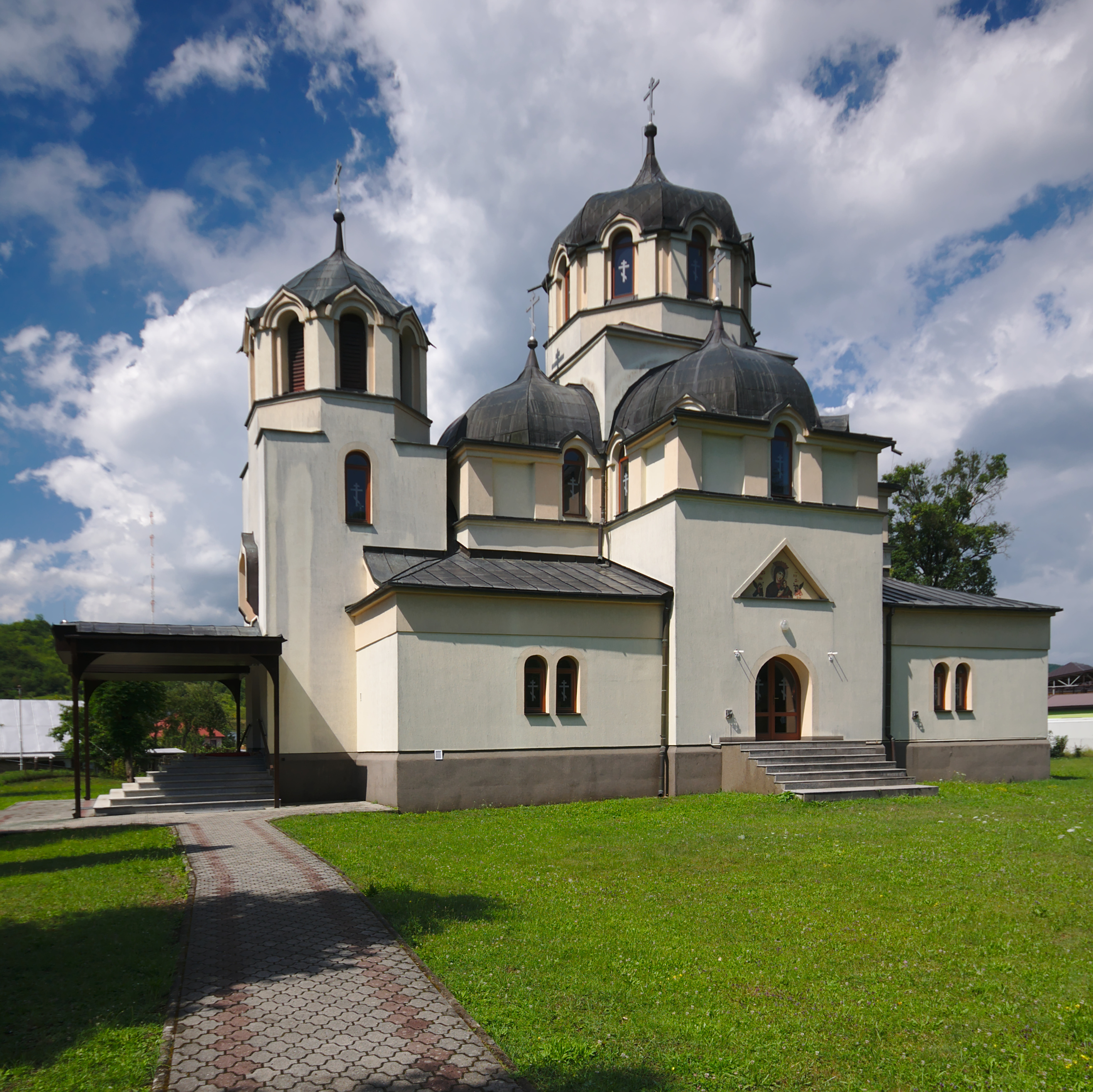 Pravoslávny chrám svätej Trojice, Stakčín, okres Snina